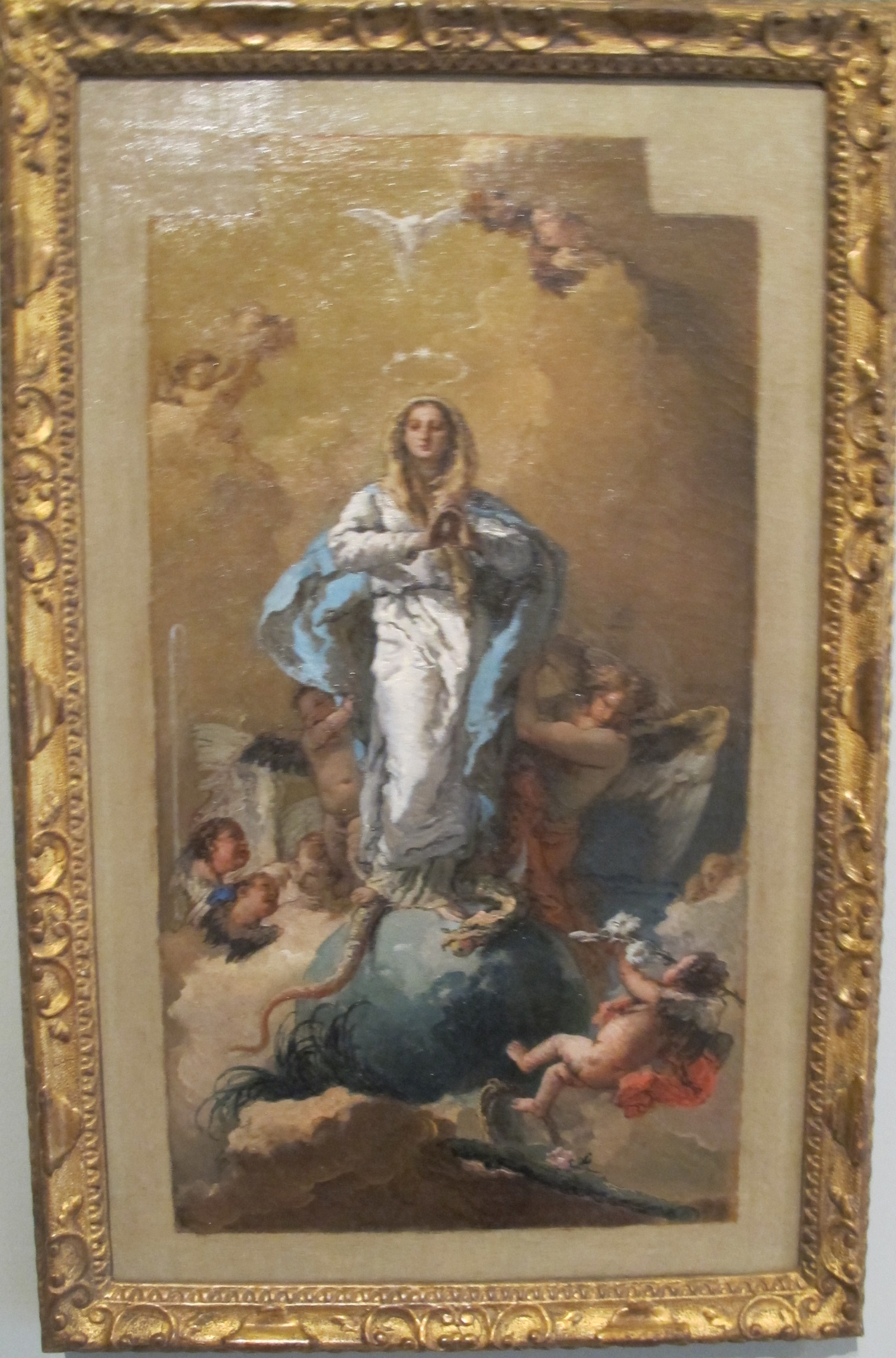 bozzetti per la chiesa di san pascual baylon ad aranjuezThe Immaculate Conceptiontitle QS:P1476,it:"bozzetti per la chiesa di san pascual baylon ad aranjuez" label QS:Lit,"bozzetti per la chiesa di san pascual baylon ad aranjuez"